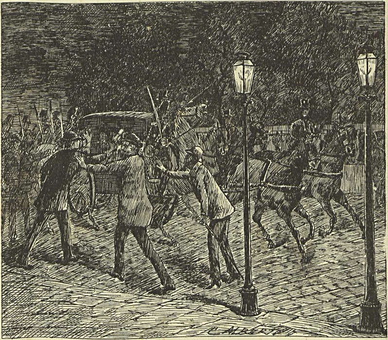 ATENTADO CONTRA O IMPERADOR DO BRASIL. — Ocorrido na noite de 15 para 16 de julho de 1889 (Segundo um croquis enviado pelo nosso correspondente).